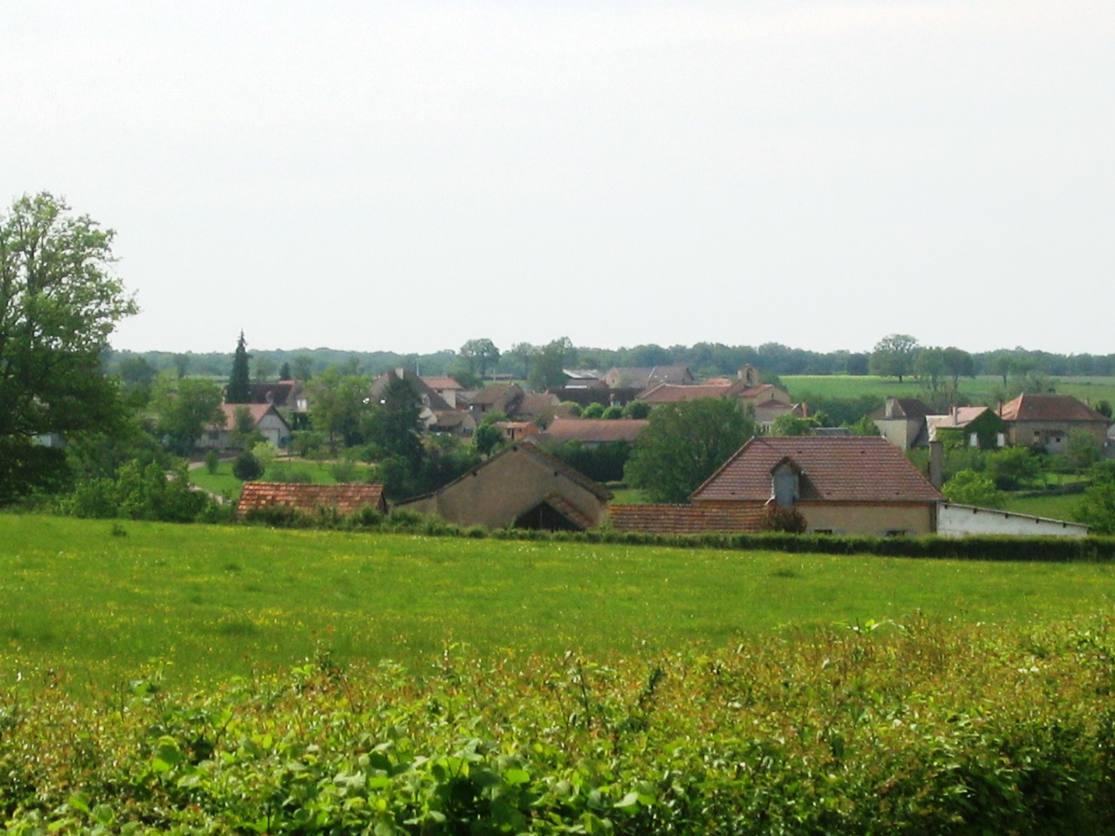 Vue du bourg de Neuilly depuis le lieu-dit "la Montée"